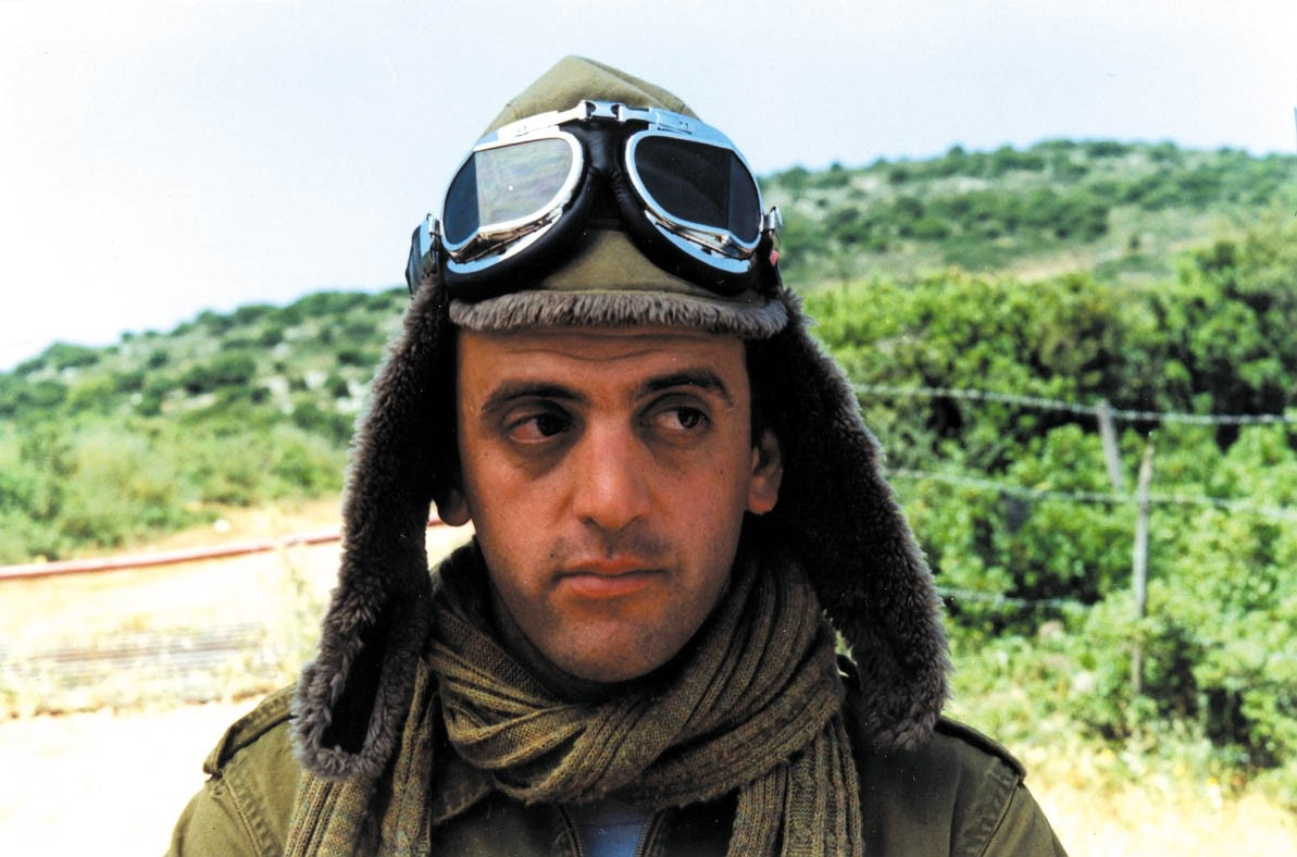 יורם חטב בסרטו של אייל חלפון "קרקס פלשתינה", 1998